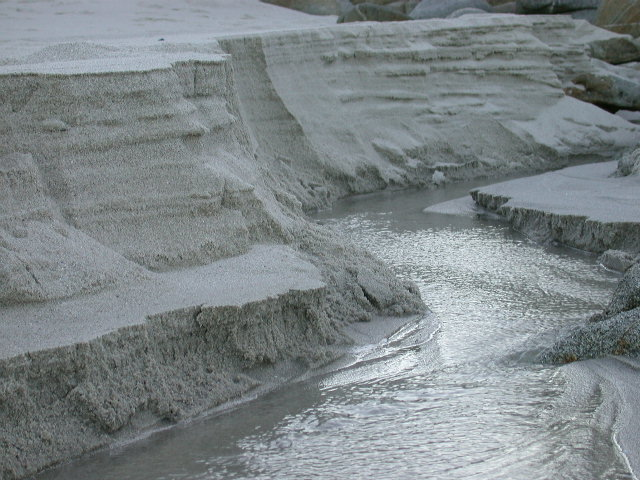 Rio do Fials, que verte no Orxás e logo na Ria de Aldán.